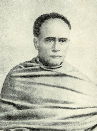 Ishwar Chandra Vidyasagar (Bengali: ঈশ্বর চন্দ্র বিদ্যাসাগর Ishshor Chôndro Biddashagor) (1820-1891)